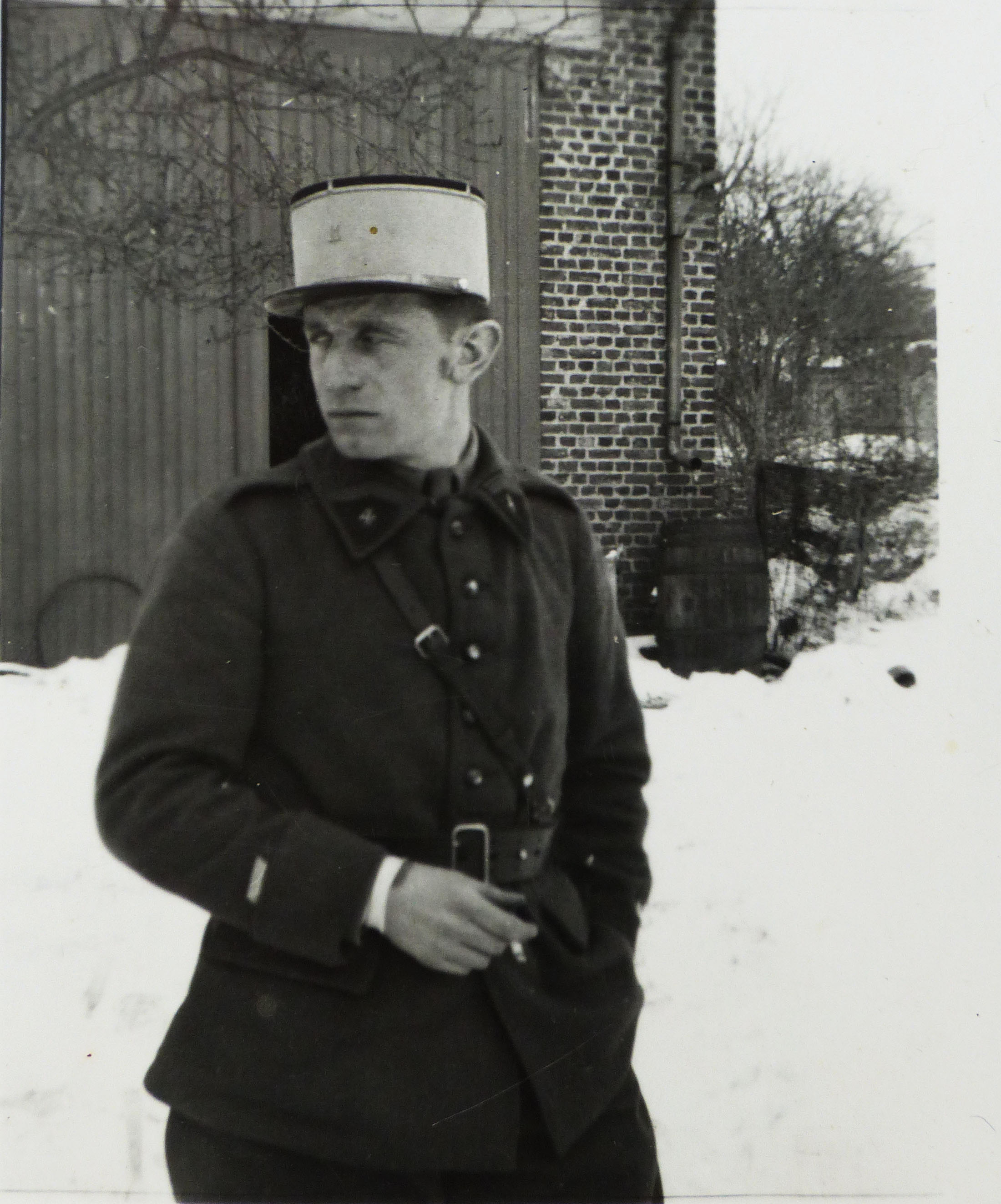 Jean Collot 4e GRDI en janvier 1940 à Chauny chez M. Bolandard